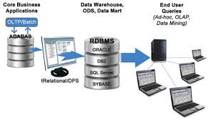 Монгол: Харьцаа өгөгдлийн санд хамрагдаж байгаа өгөгдлийн сангууд